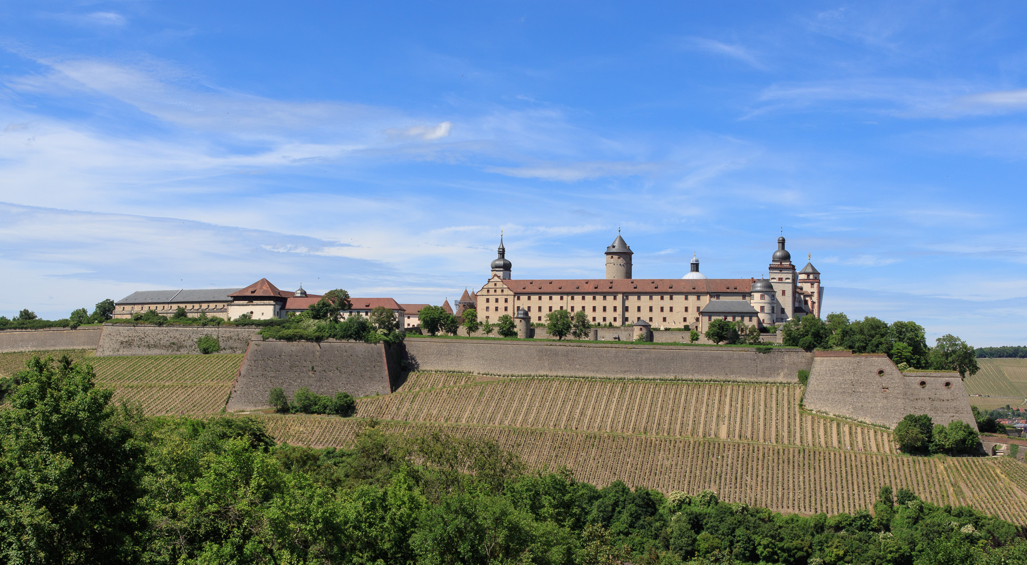 Festung Marienberg - Würzburg - 2013